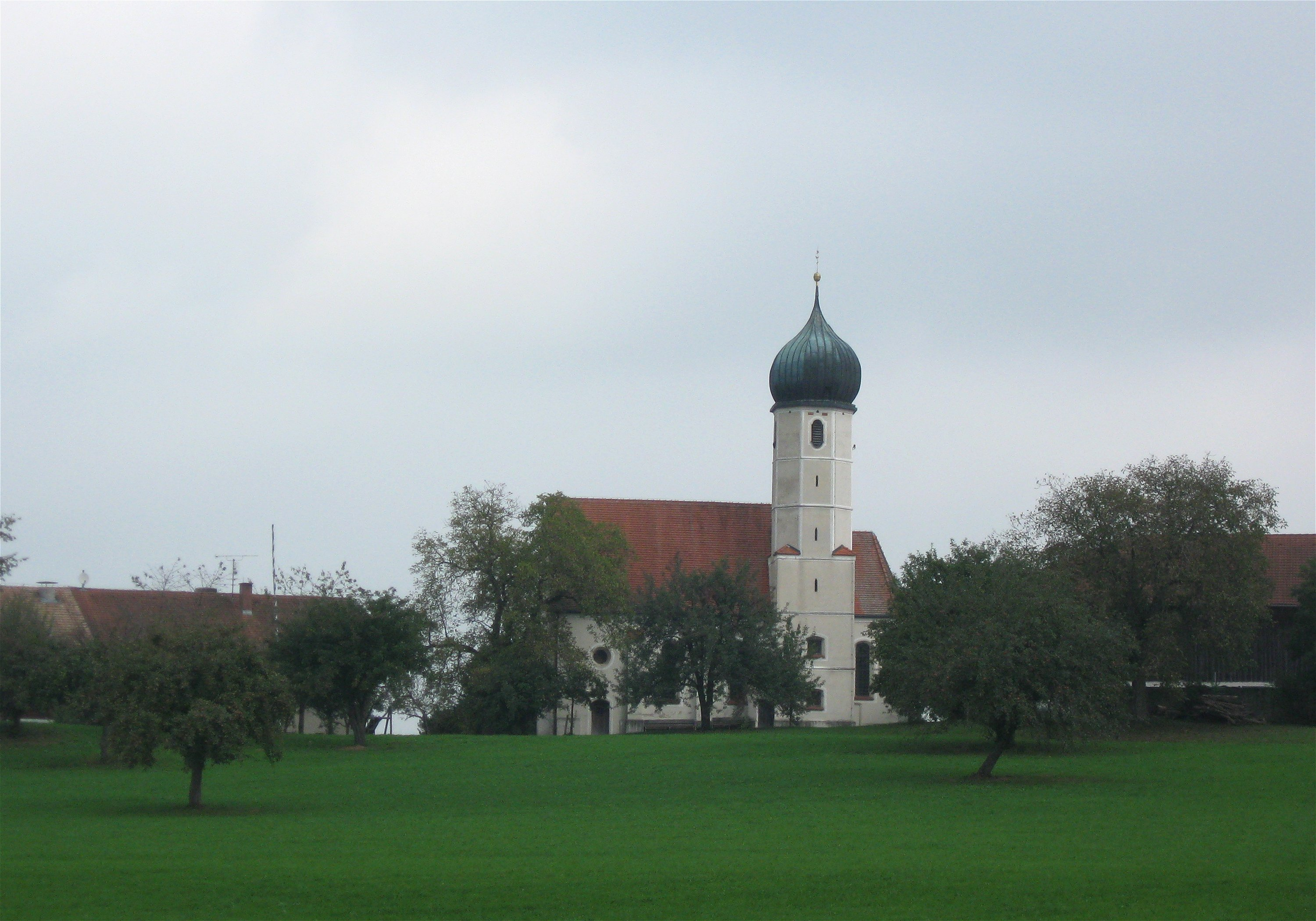 Kath. Filialkirche St. Maria; Renaissancebau, 1642; mit Ausstattung. Weiterskirchen, Baiern, Landkreis Ebersberg